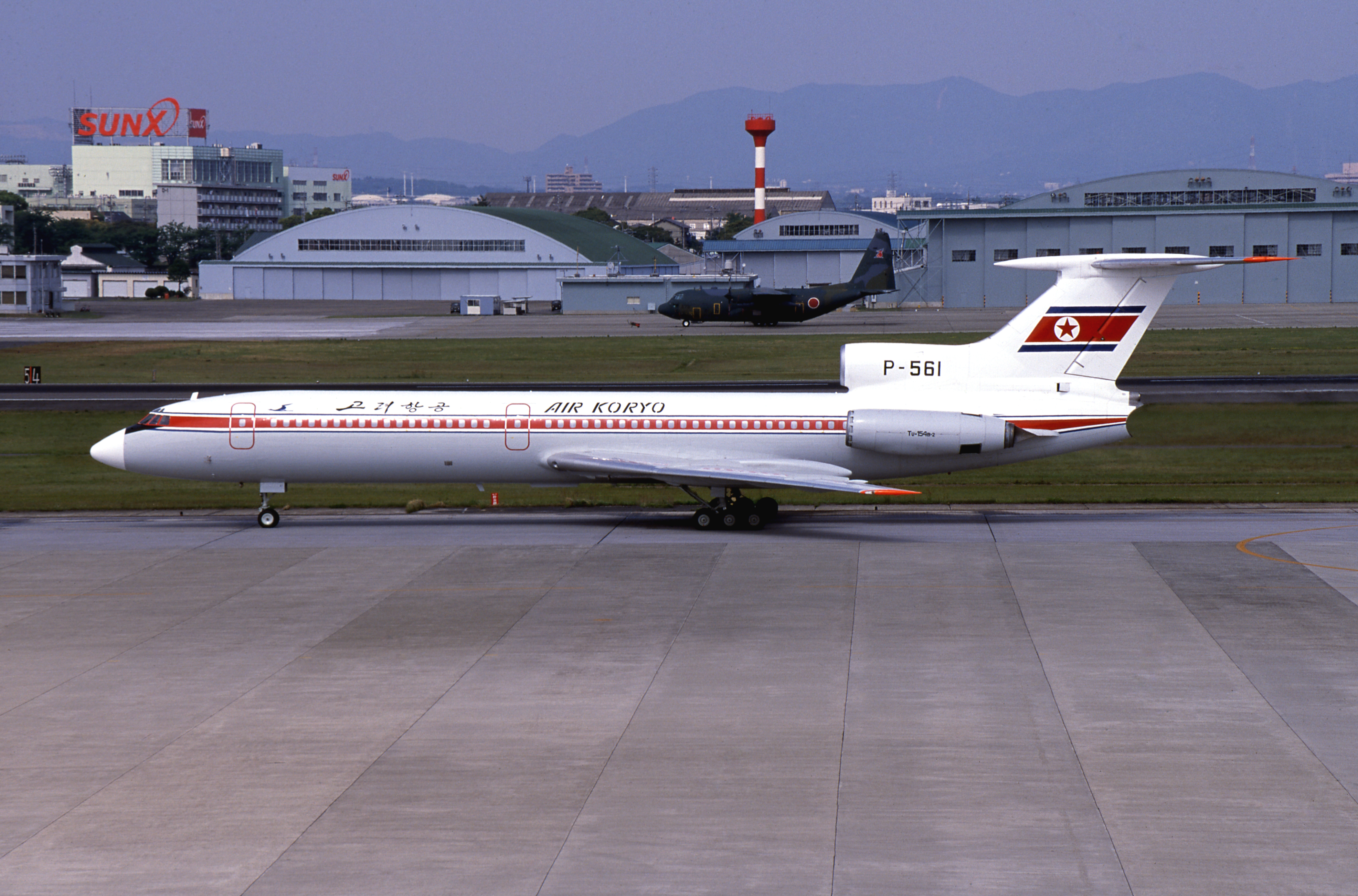 Air Koryo Tupolev 154B-2 (P-561587)